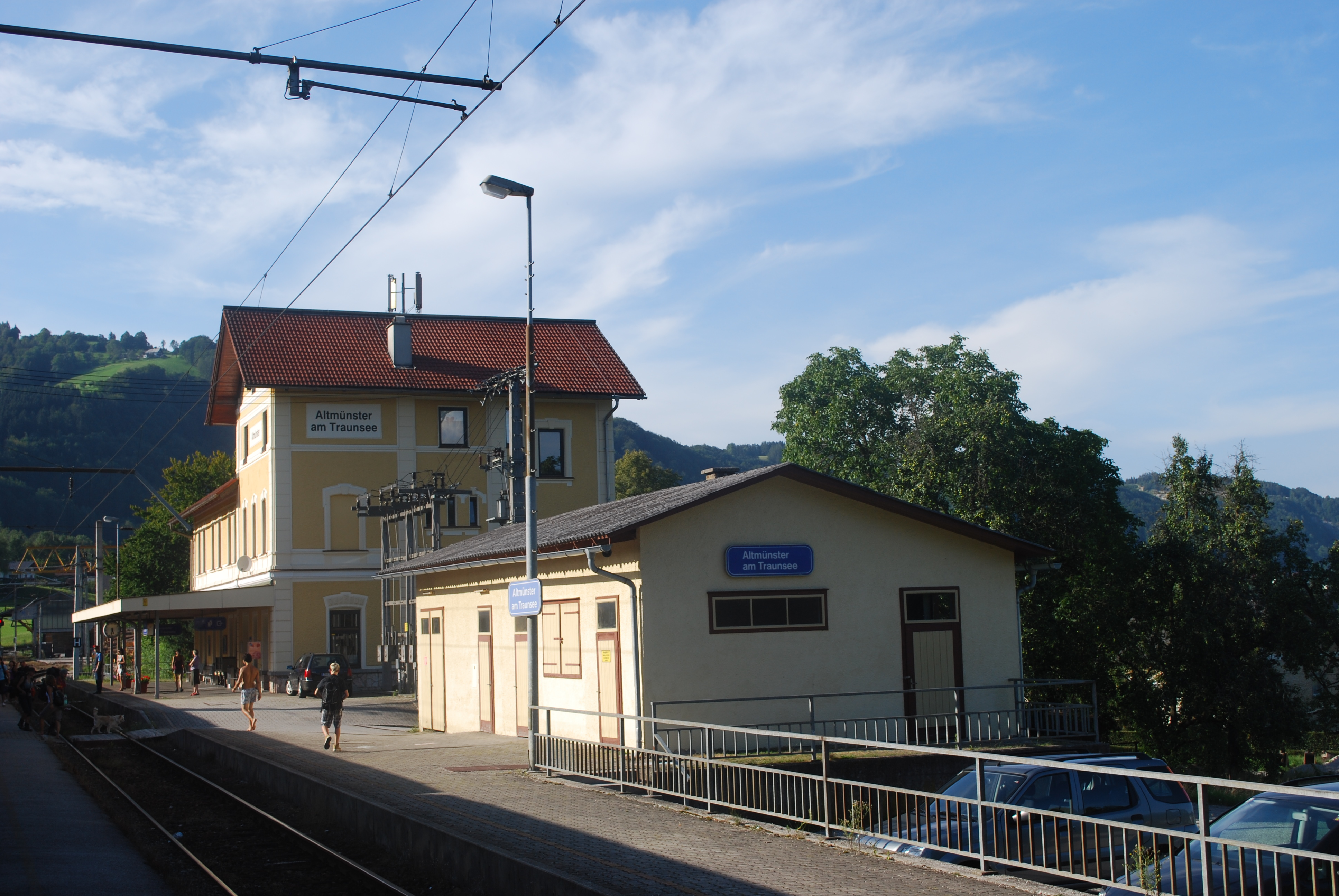 Bahnhof Altmünster vom Süden aus